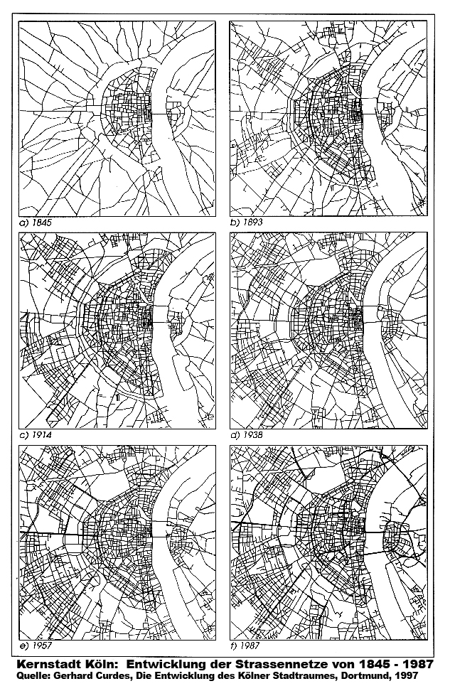 Kernstadt Köln: Entwicklung der Strassennetze von 1845 - 1987. Die Entwicklung des Kölner Stadtraumes